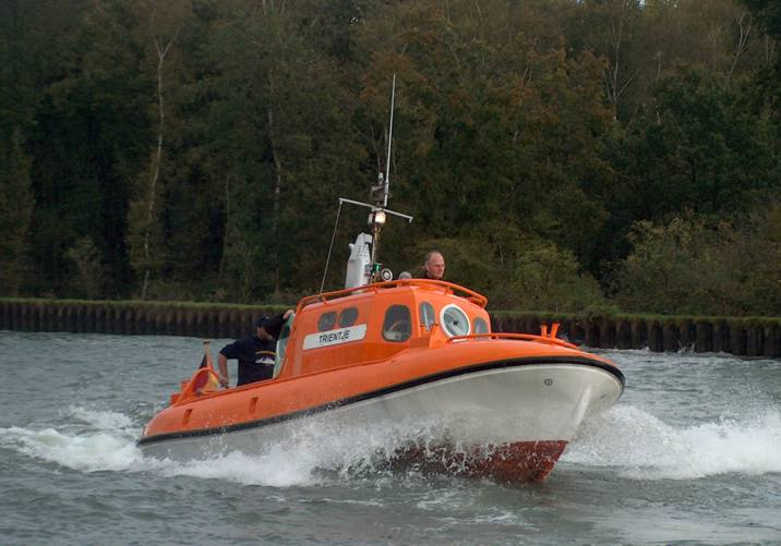 Ehemaliges Seenotrettungsboot Trientje der DGzRS, jetzt in Privathand Aufnahme aus Oktober 2004/Rhein-Herne-Kanal